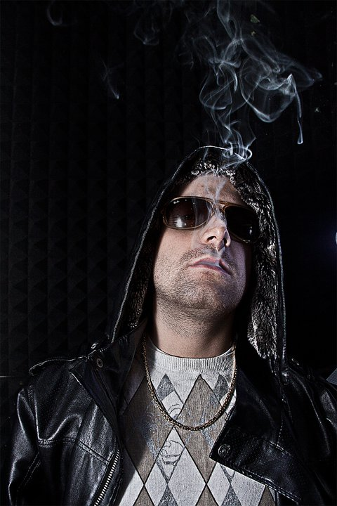 Medizin Mann (2011)